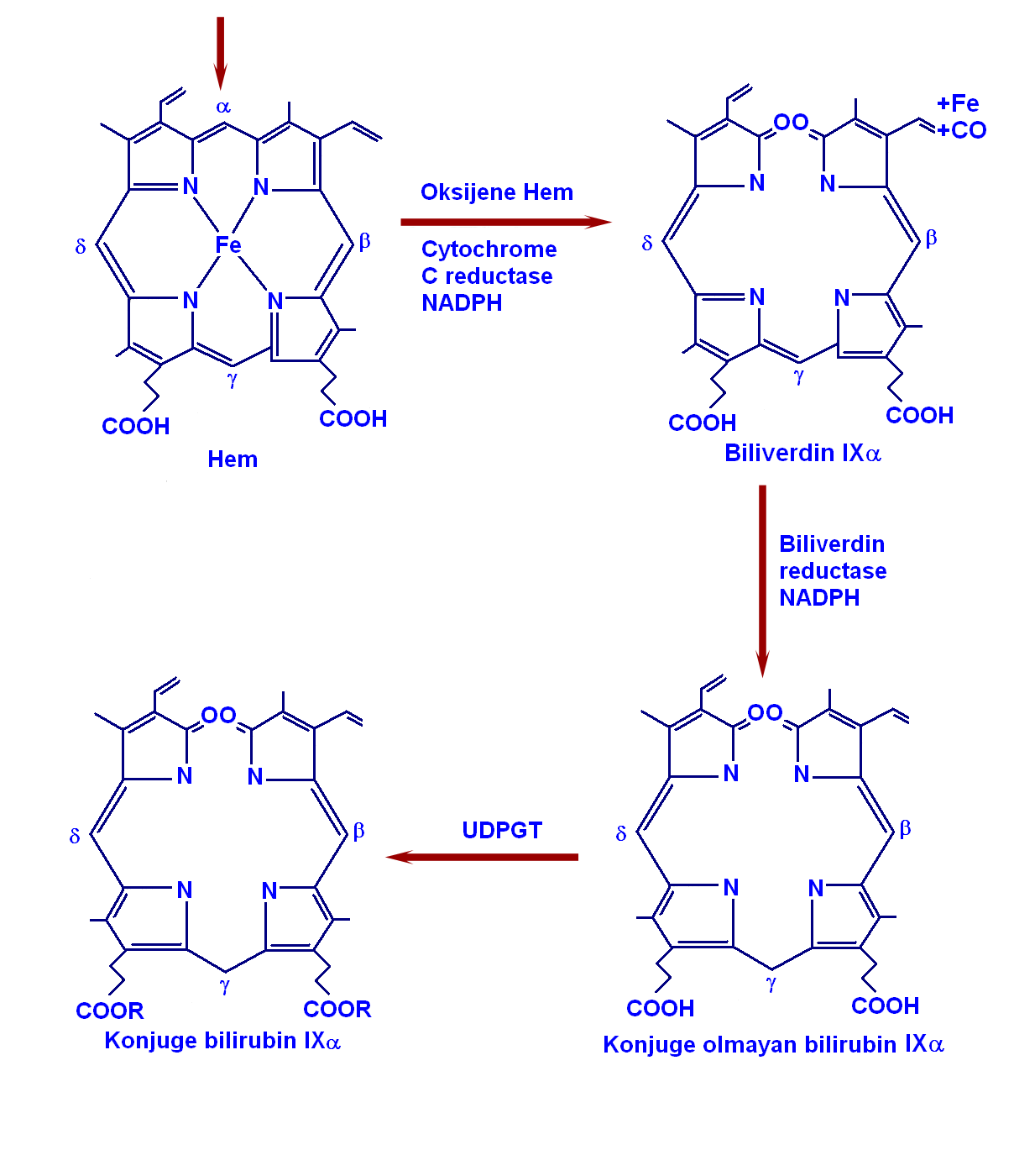 Bilirubin dönüşüm şeması